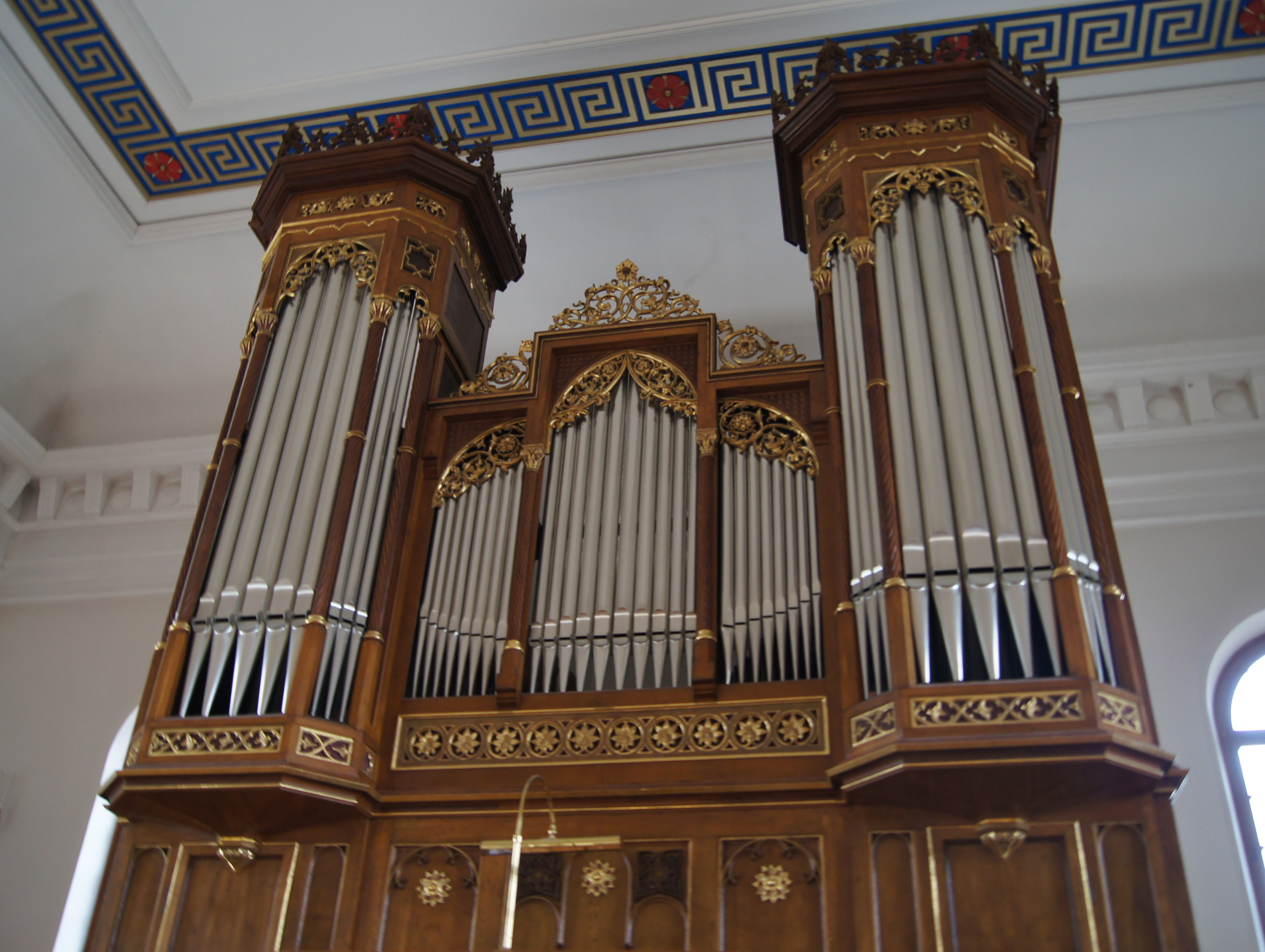 Reformierte Kirche, Haas-Orgel